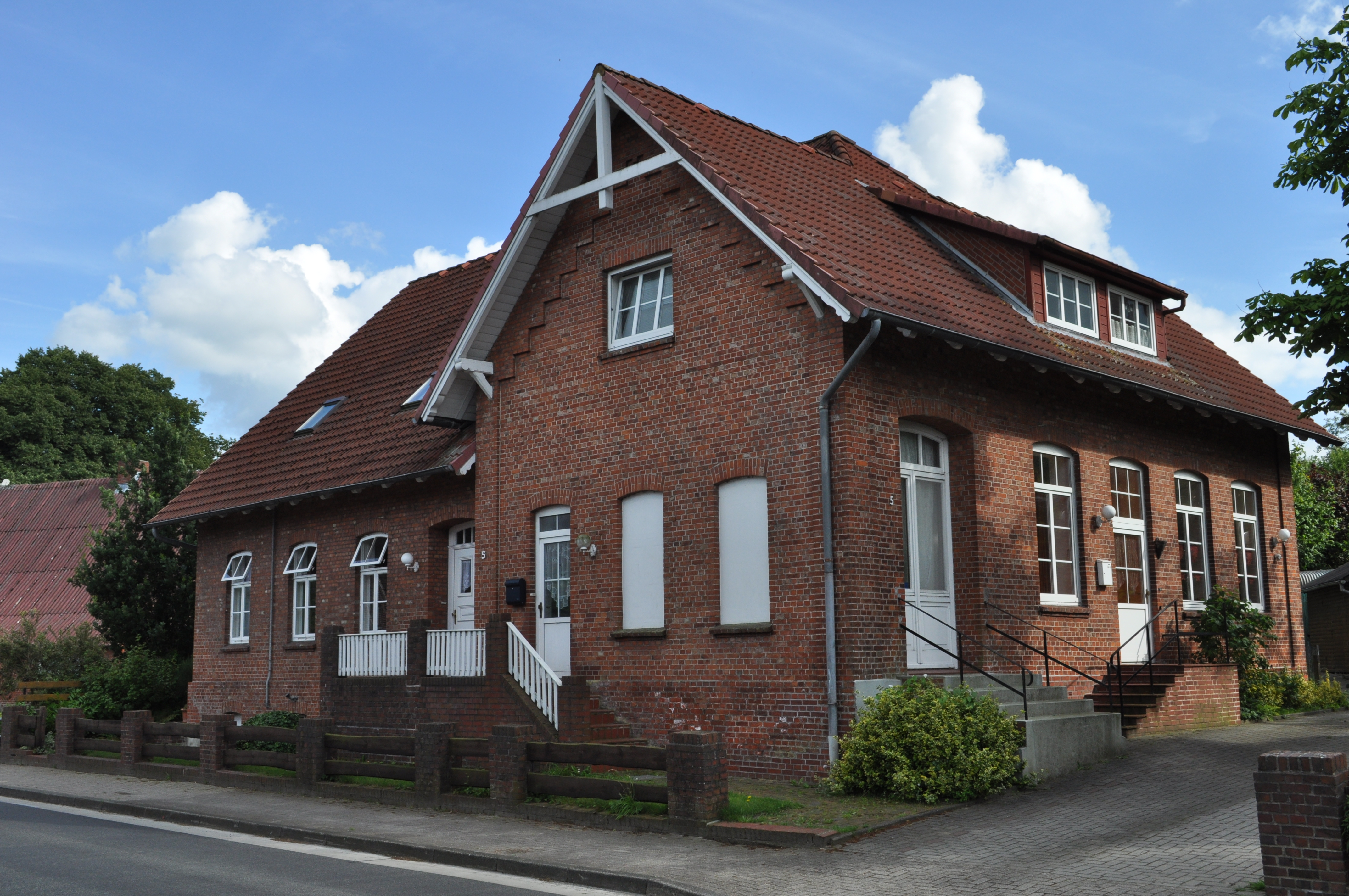 Ehemalige Schule in der Westersoder Schulstraße 5 in Hemmoor-Westersode. This is a photograph of an architectural monument. .202.200.032